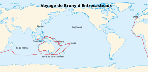 Carte représentative du voyage du navigateur français Antoine Bruny d'Entrecasteaux.